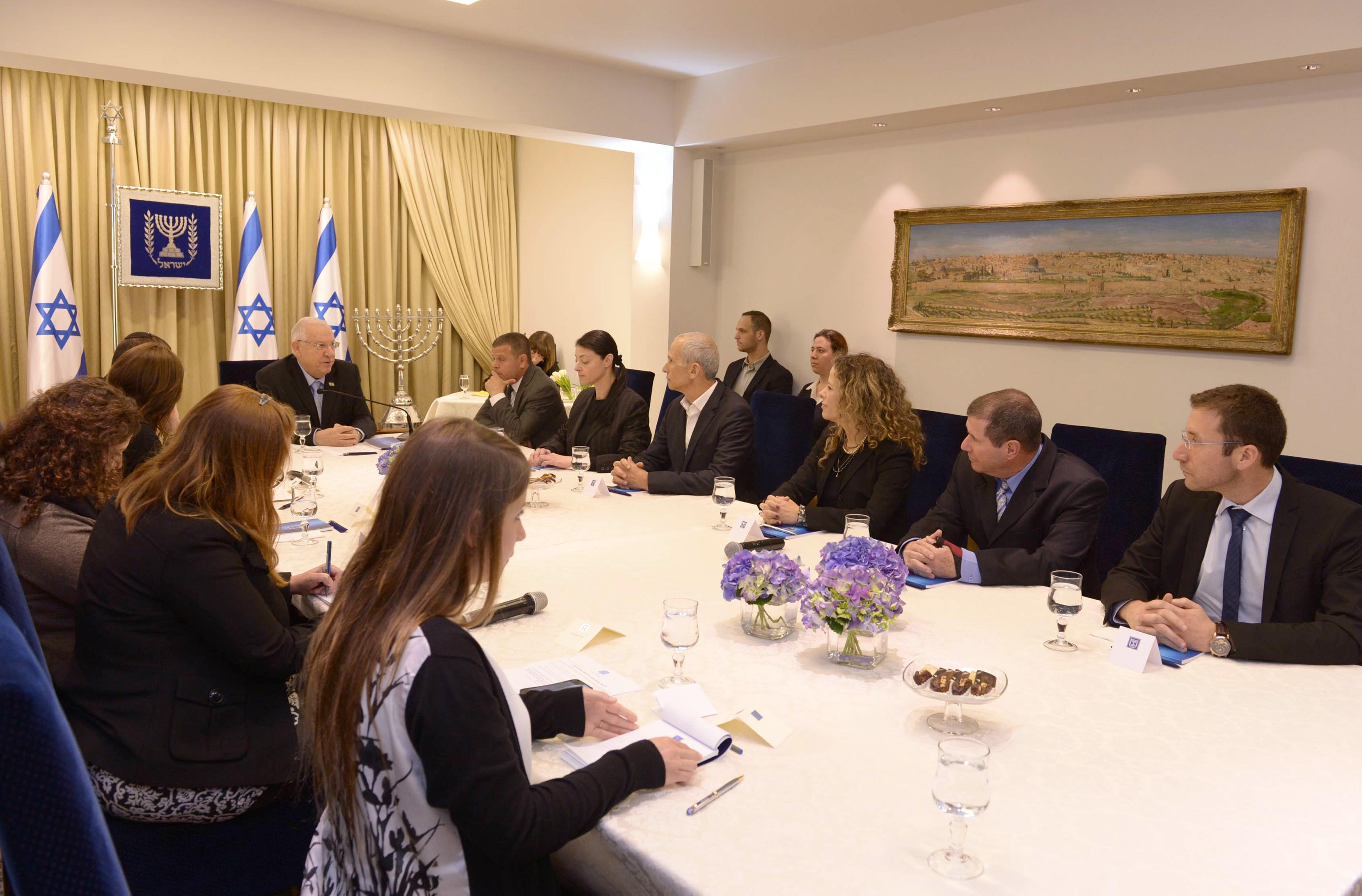 נשיא מדינת ישראל ראובן ריבלין פותח בהתייעצויות עם המפלגות השונות לקראת הרכבת הממשלה לאחר בחירות מרץ 2015 עם המחנה הציוני